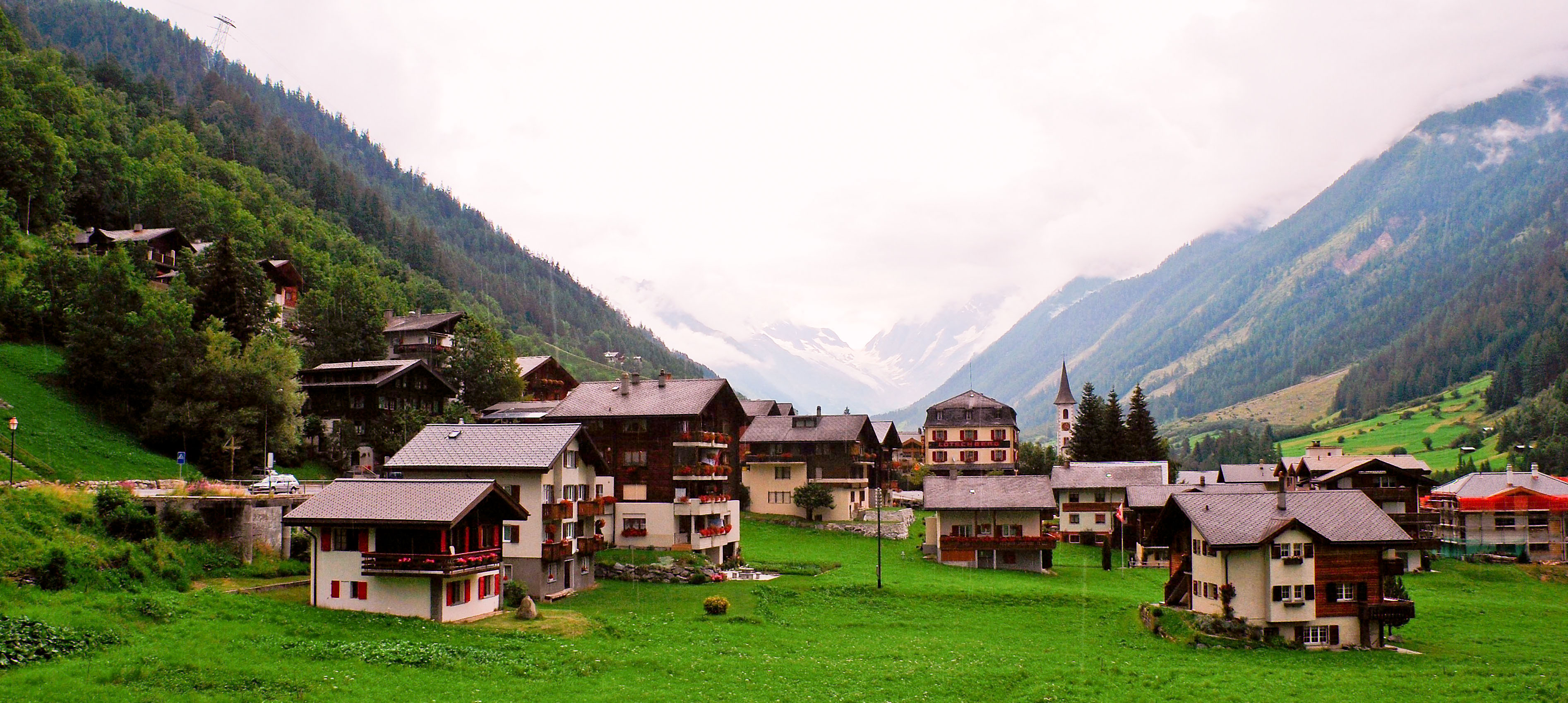 en.: Kippel at Lötschental, Switzerland; dt.: Kippel im Lötschental, Schweiz